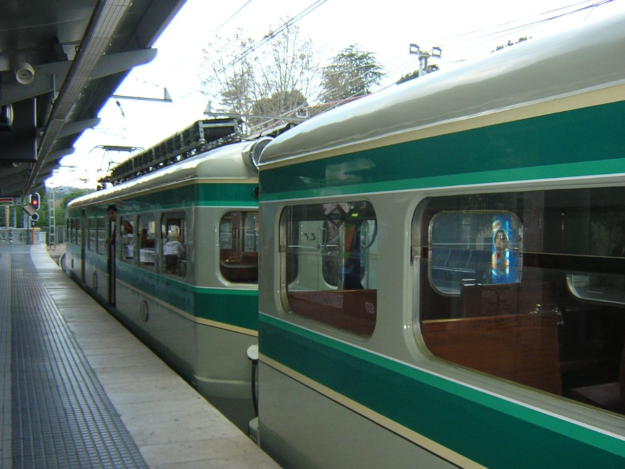 Tren de la serie "Granota" dels Ferrocarrils de Catalunya - Ferrocarrils de la Generalitat de Catalunya. expo scugat.pdf 90 aniversari FGC Estacio Sant Cugat del Valles